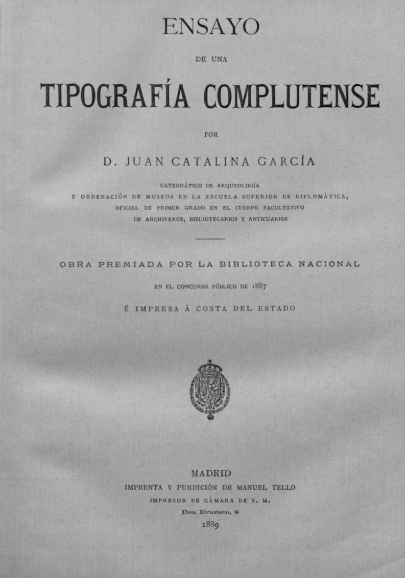 Portada del libro titulado "Ensayo de una tipografía complutense", publicado por Juan Catalina García en 1889.